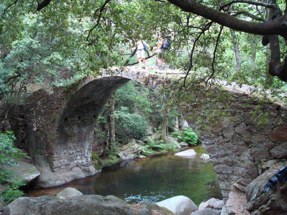 Pont de Zeglia (pont génois) sur la rivière Tavulella, dans les gorges de Spelonca en Corse du Sud